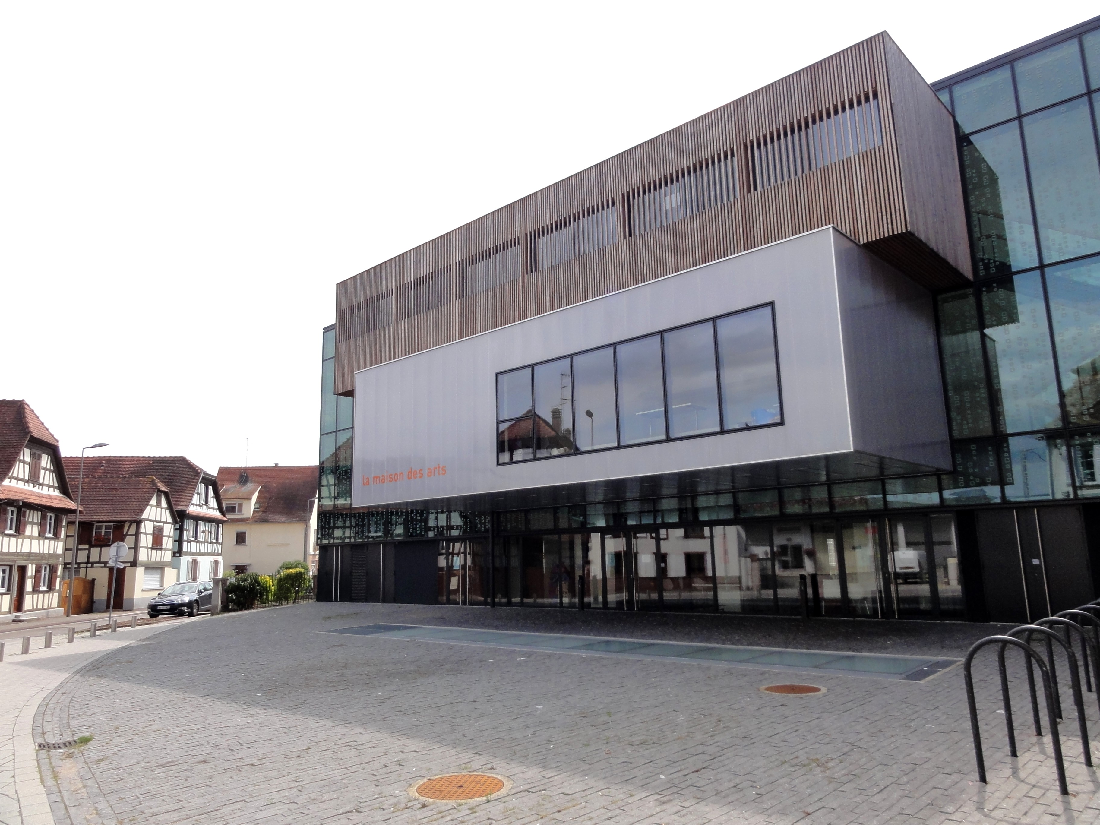 Alsace, Bas-Rhin, Lingolsheim, Maison des Arts.